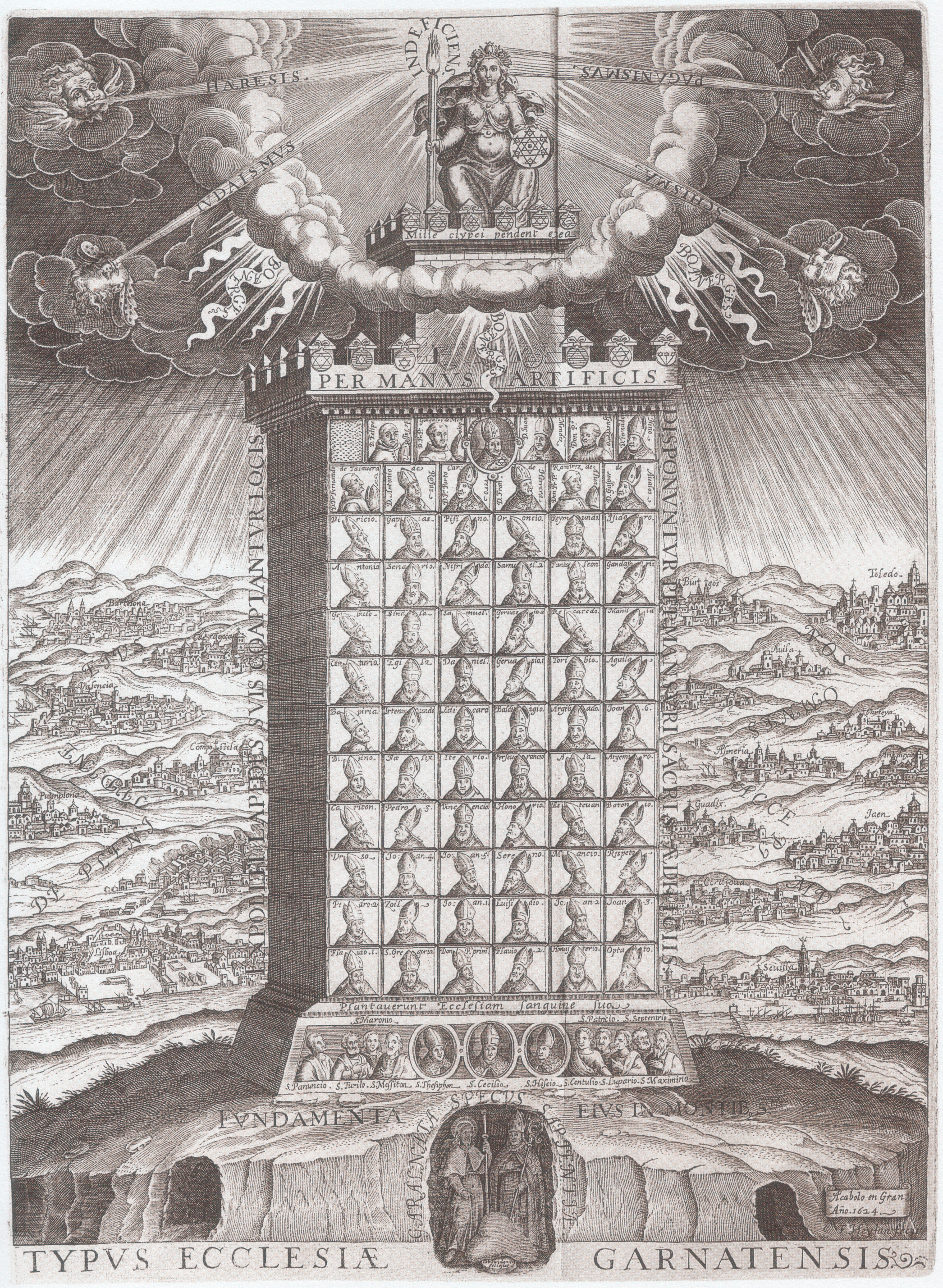 La torre de los obispos o episcopologio granadino.